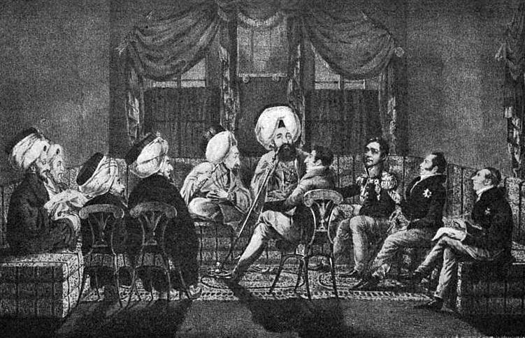 Аккерманская конференция 25 сентября 1826 года. Слева направо: ? ? ? ? Ибрагим-Ефенди Хади-Ефенди А. Фонтон кн. М. Воронцов кн. Рибопьер ? ?